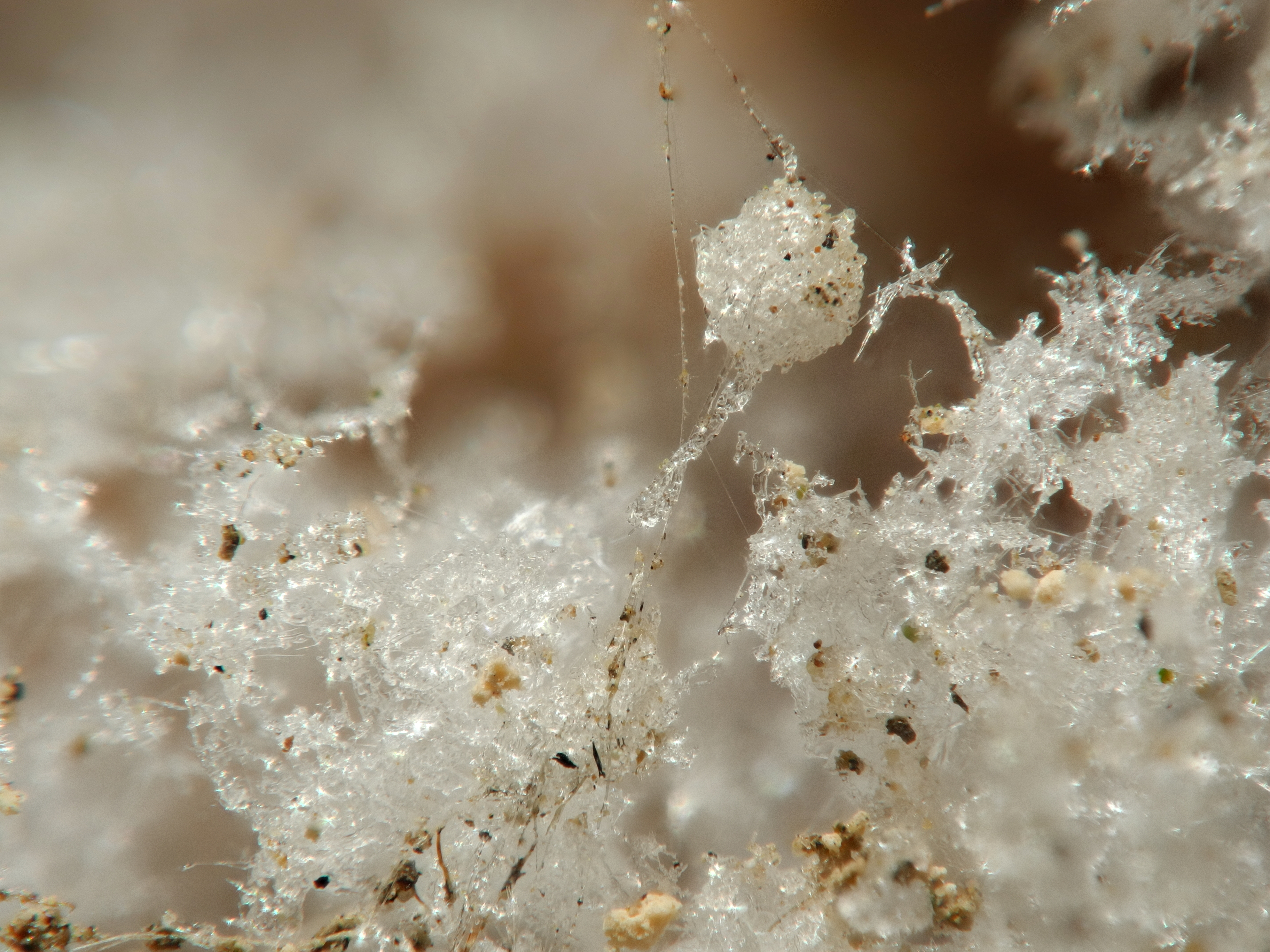 Focus stacking of 40 pictures (using Zerene Stacker).Salpêtre (focus stacking). Image composée de 40 photos prises avec la bonnette Raynox MSN-505 et assemblées avec Zerene Stacker.